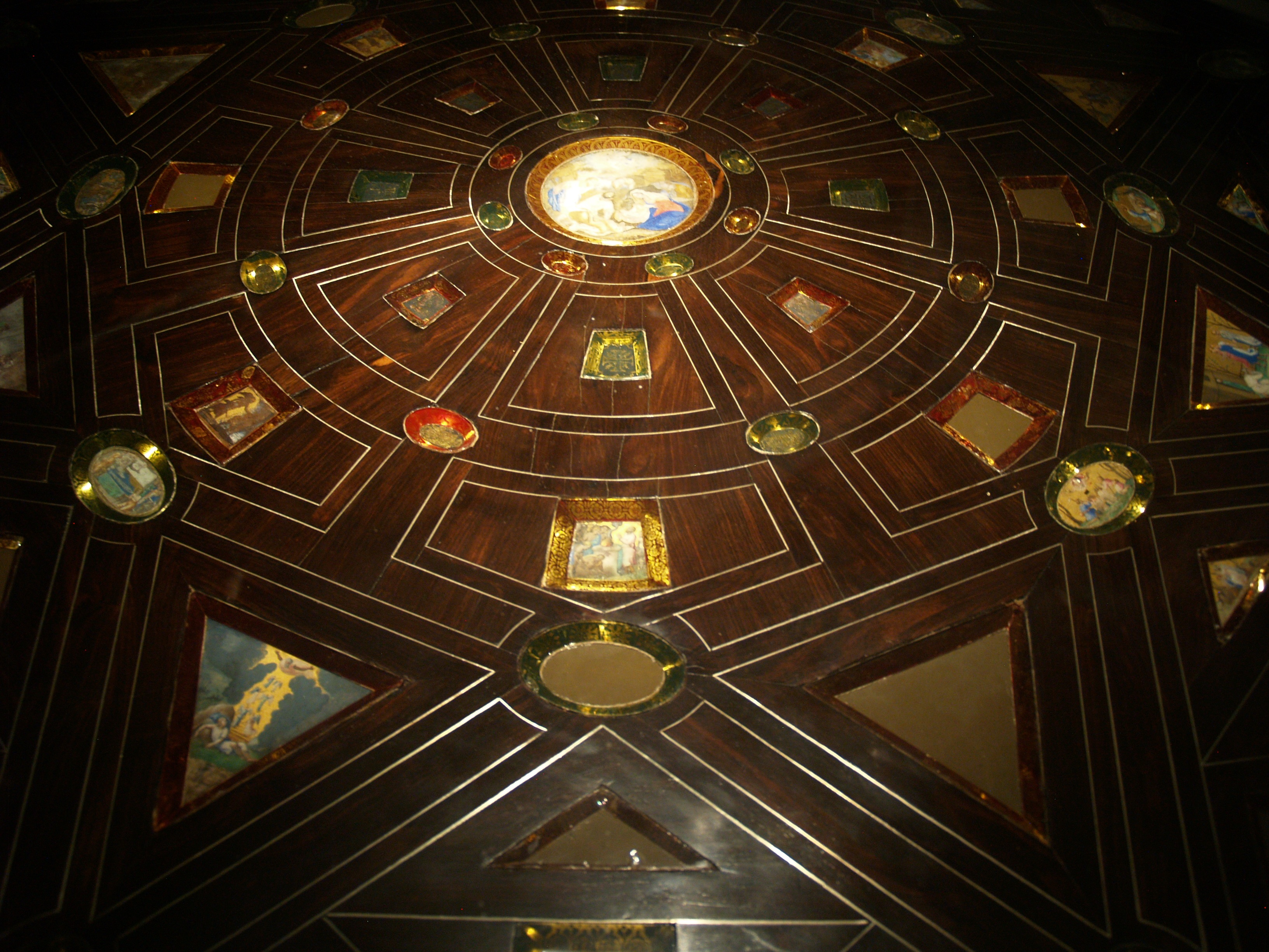 Berlín Kunstgewerbe Museum. Mesa decorada con miniaturas, s. XVII.